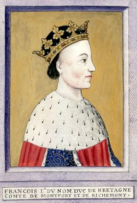 François I de Bretagne